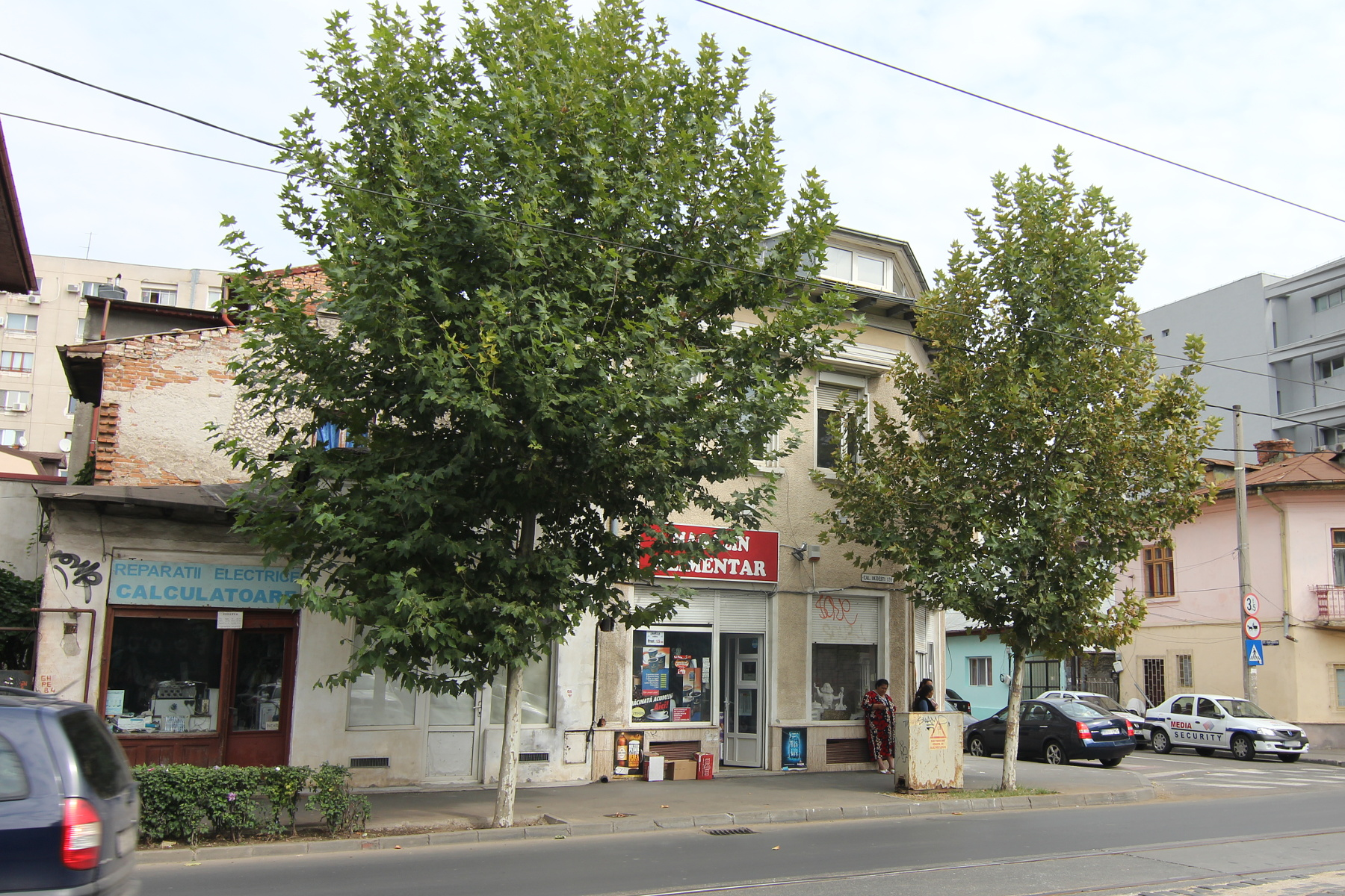 Casă pe Dudești